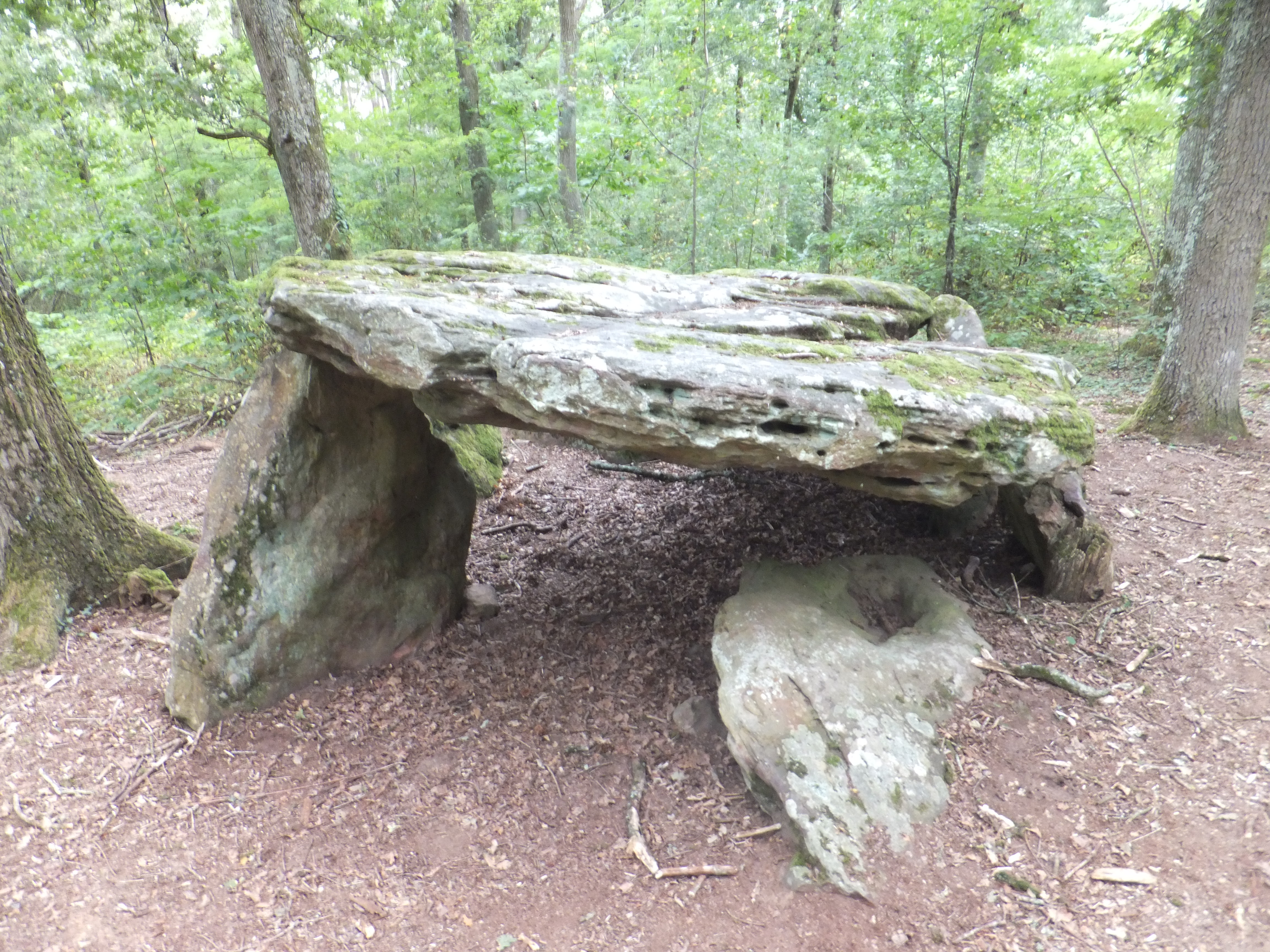 Pierre couverte de Bué (Classé) .